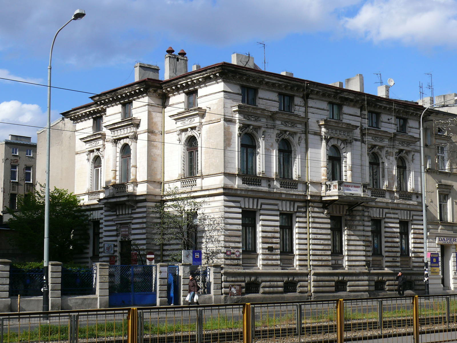 Willa Gustawa Schreera przy ul. Narutowicza 48 w Łodzi